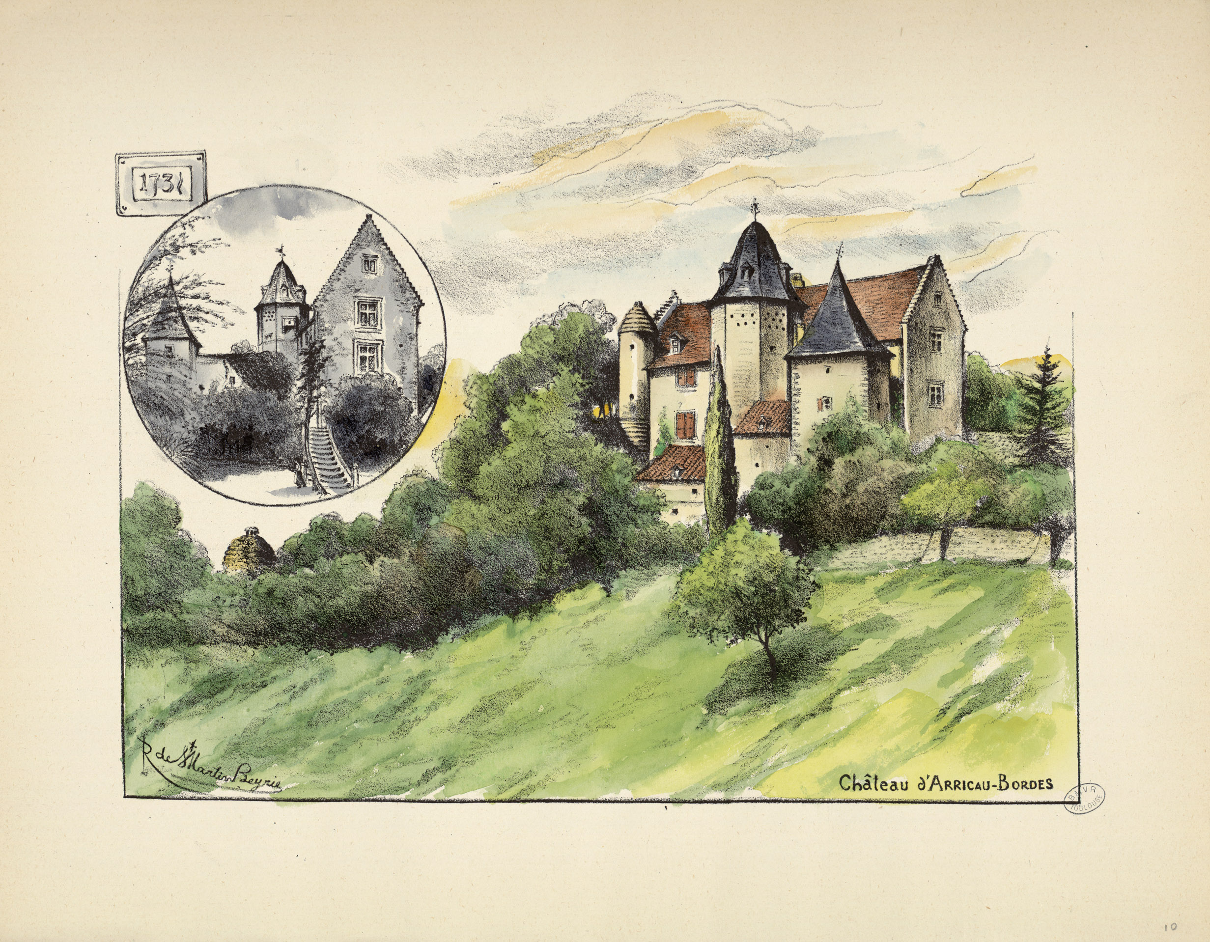 Ancely, René (1876 - 1966). Possesseur